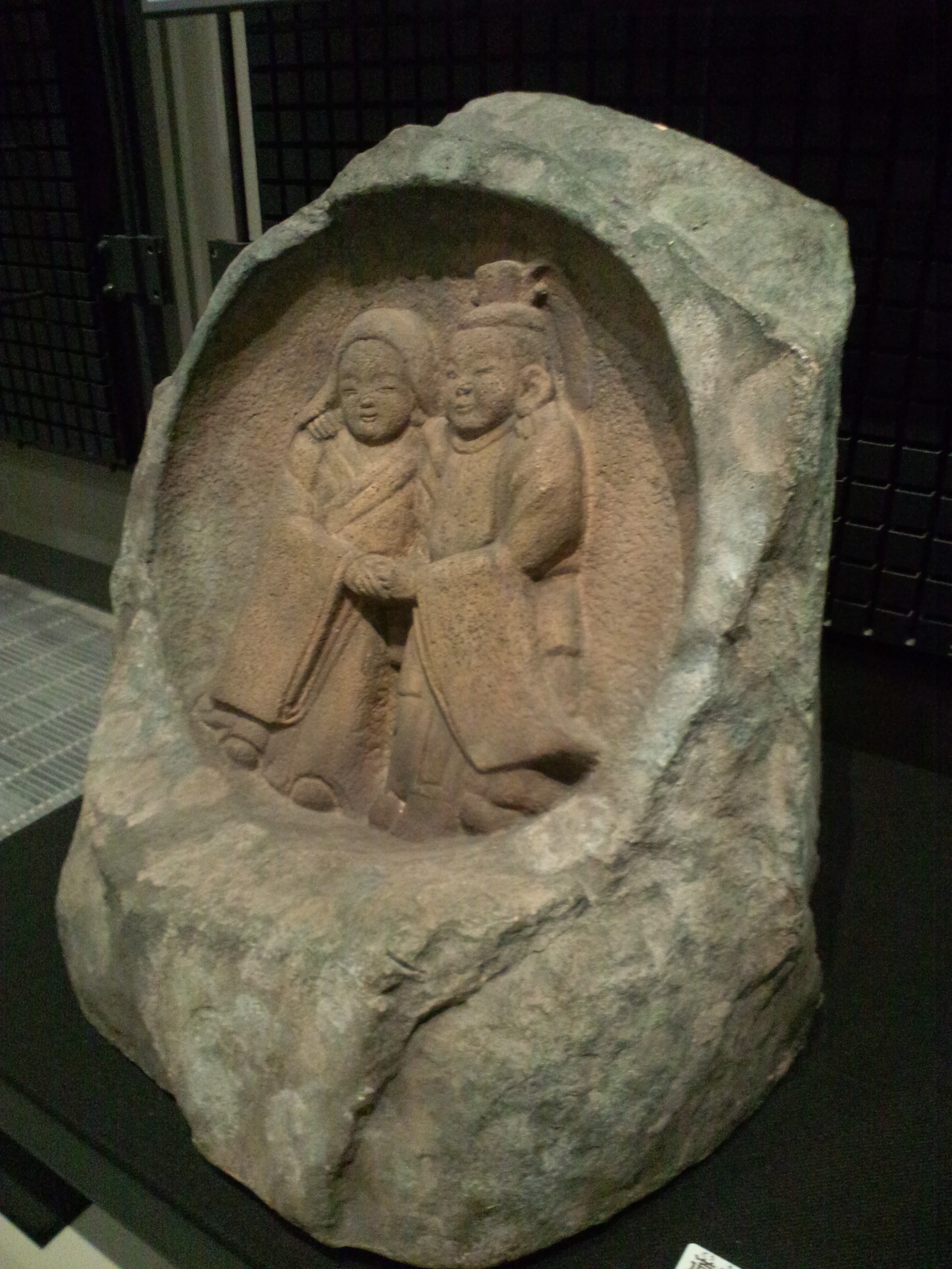 国立民族学博物館（大阪） 道祖神（長野県、上田市、1979年製作）